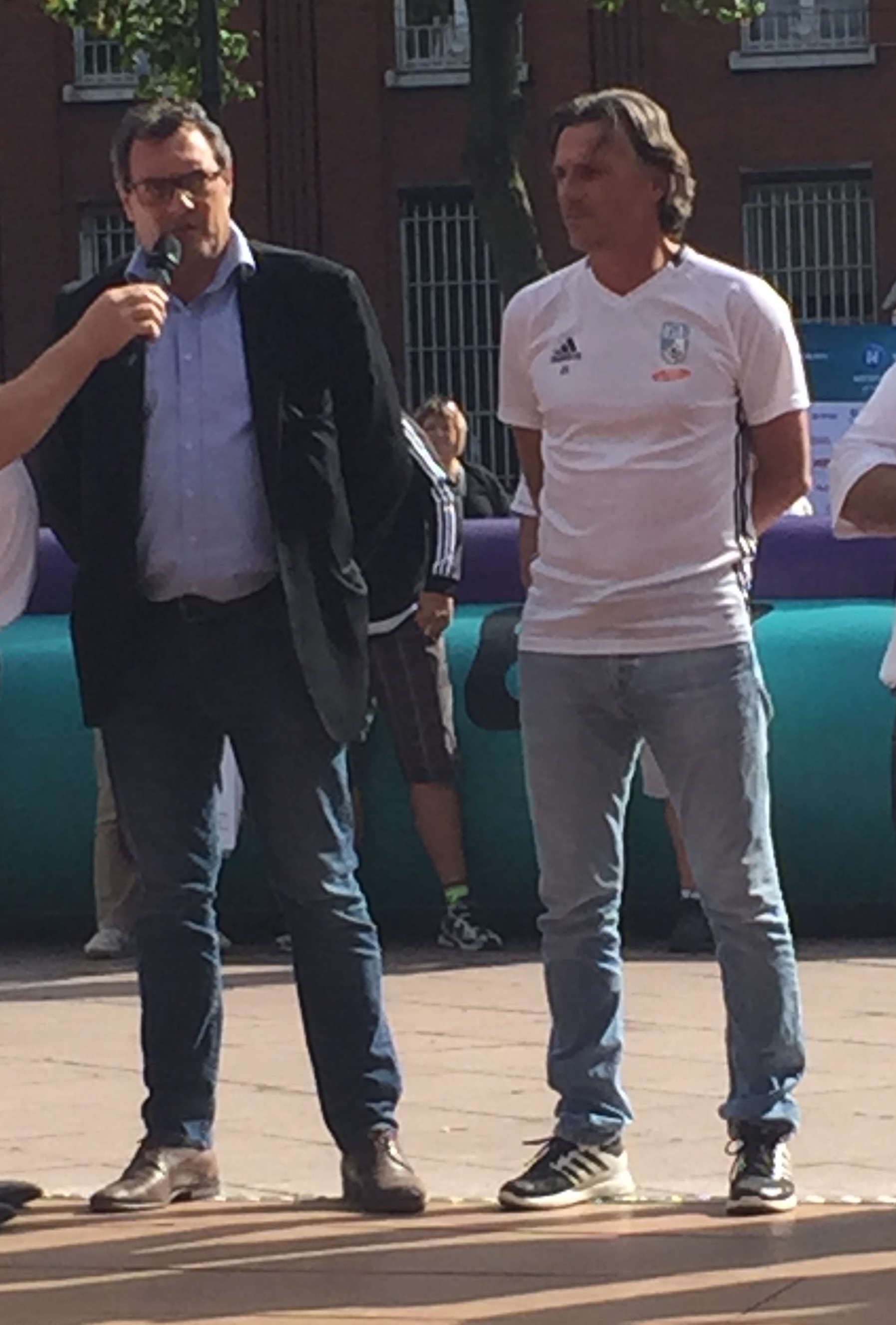 Didier Santini et Jean-Pierre Scouarnec, respectivement entraîneur et président de l'USL Dunkerque, lors de la présentation de l'équipe pour la saison 20116-2017.